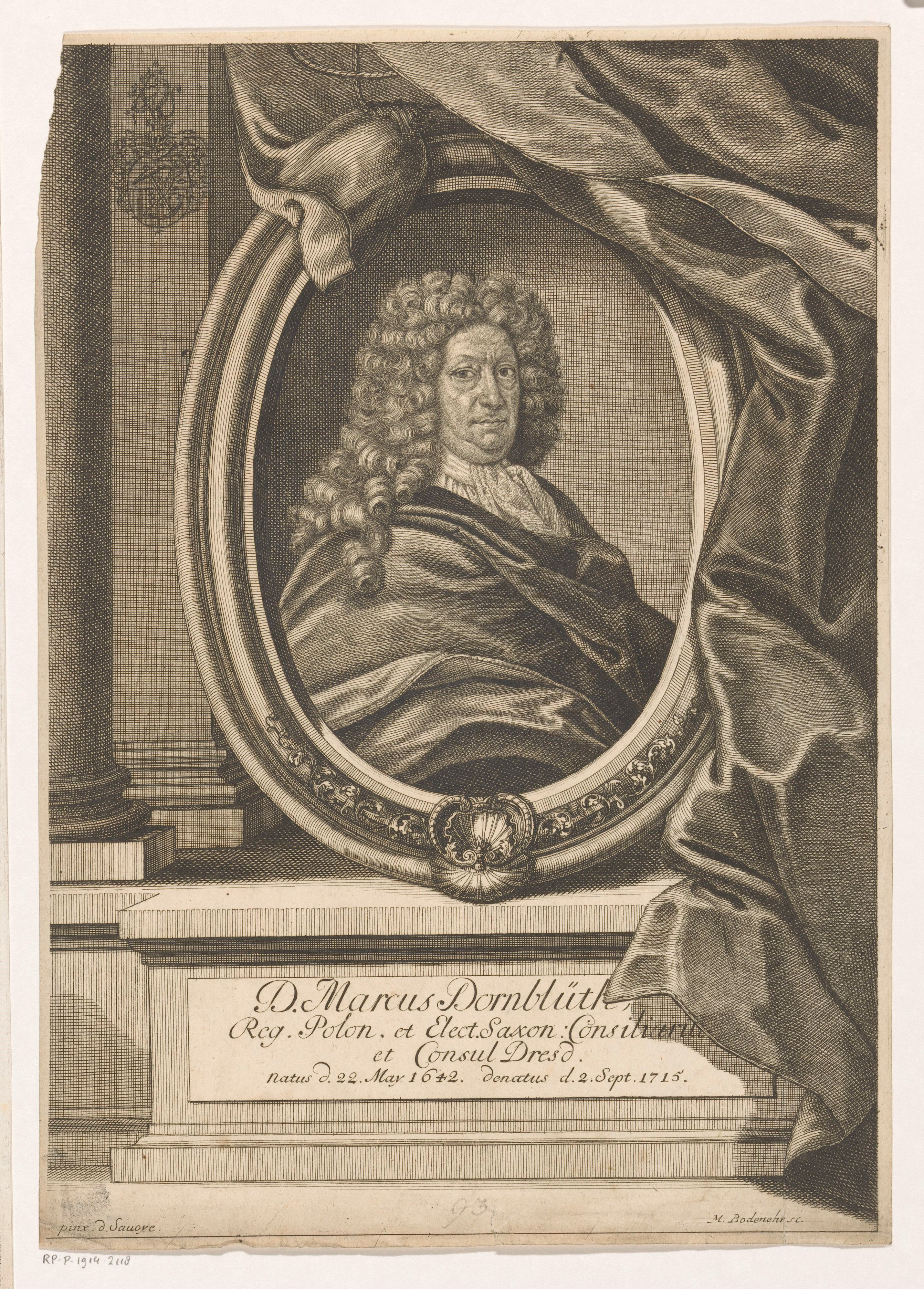 IdentificatieTitel(s): Portret van Marcus DornblüthObjecttype: prent Objectnummer: RP-P-1914-2118Catalogusreferentie: HAB A 5103Opschriften / Merken: verzamelaarsmerk, verso, gestempeld: Lugt 2228VervaardigingVervaardiger: prentmaker: Moritz Bodenehr (vermeld op object)naar schilderij van: Daniel de Savoye (vermeld op object)Plaats vervaardiging: DresdenDatering: 1715 - 1748Materiaal: papier Techniek: etsen / graveren (drukprocedé) / stippelwerkAfmetingen: blad: h 297 mm (binnen de plaatrand afgesneden) × b 209 mm (binnen de plaatrand afgesneden)OnderwerpWat: historical personsarmorial bearing, heraldryWie: Marcus DornblüthVerwerving en rechtenVerwerving: aankoop 1905Copyright: Publiek domein